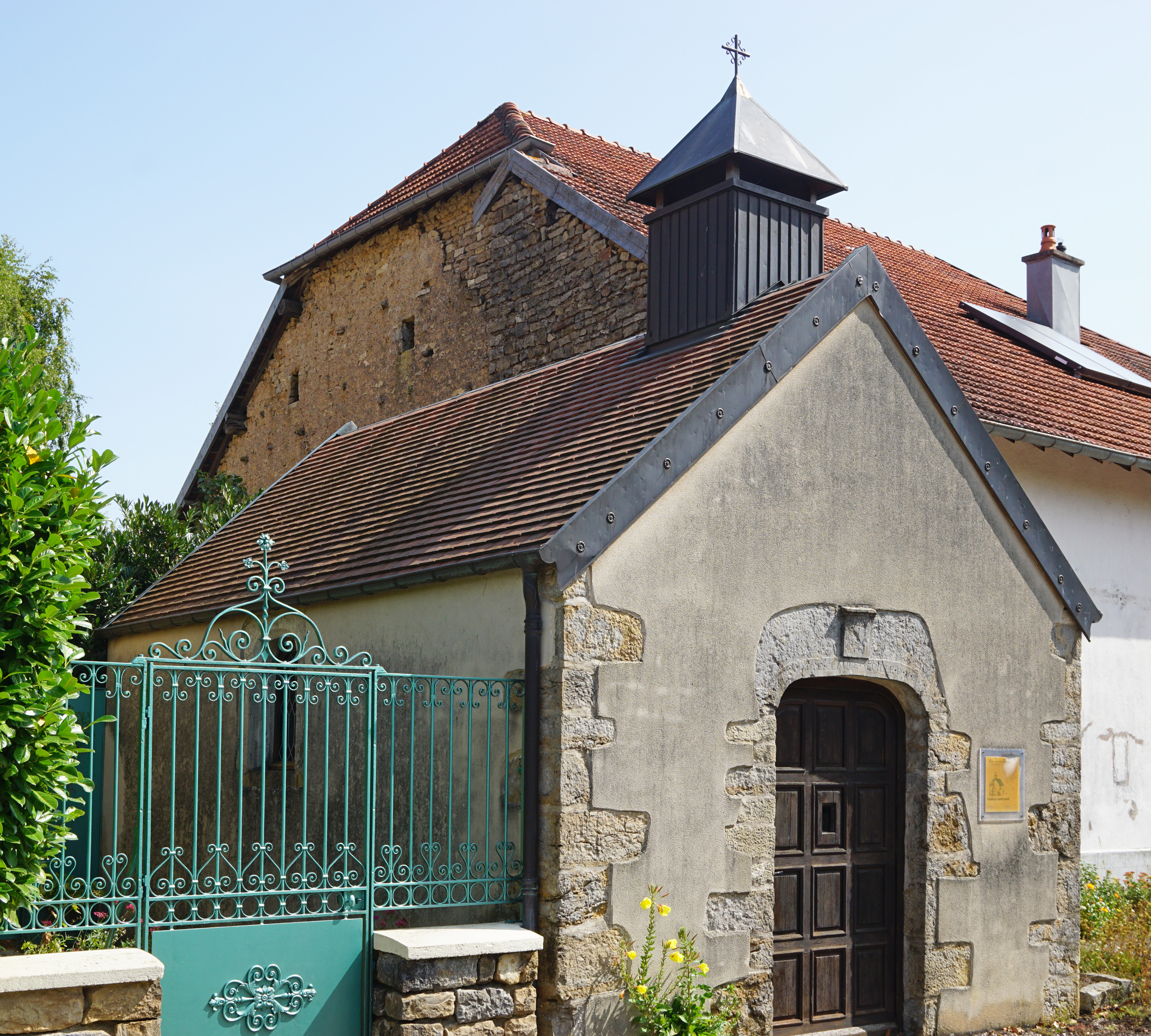 Chapelle Sainte-Anne de Gouhelans.